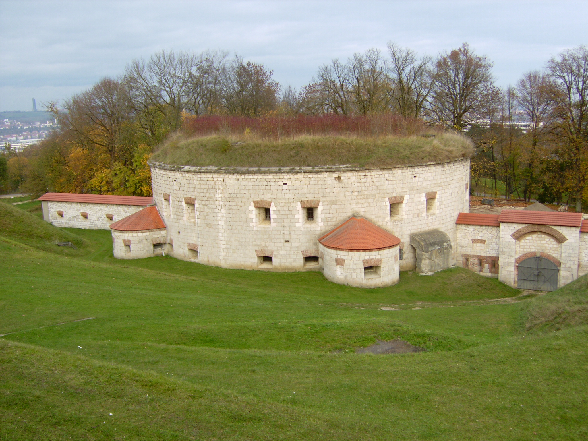 Bundesfestung Ulm, Werk XXXII, Fort Oberer Kuhberg, Reduit